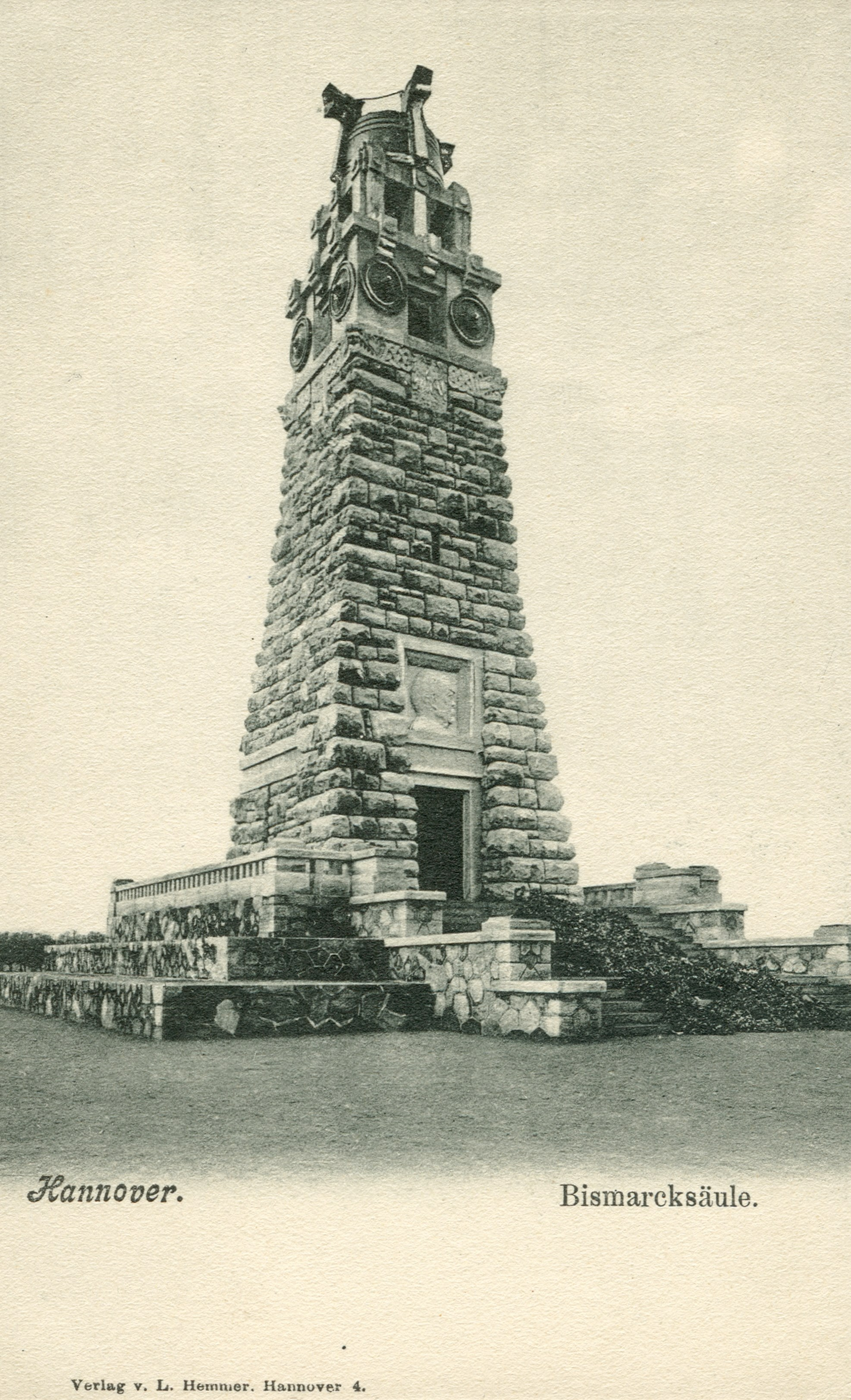 Bildseite der Ansichtskarte Nummer 4 von Ludwig Hemmer; zu sehen ist die Bismarck-Säule" in Hannover, 1903/04 von Architekt Alfred Sasse errichtet. Im Dritten Reich organisierte hier am 10. Mai 1933 der "studentische Kampfausschuß" die Bücherverbrennung, fadn am 24. September 1933 der (letzte) Aufmarsch des "Stahlhelm-Bundes der Frontsoldaten" statt. Für den Bau des Maschsees wurde die Säule restlos abgetragen.